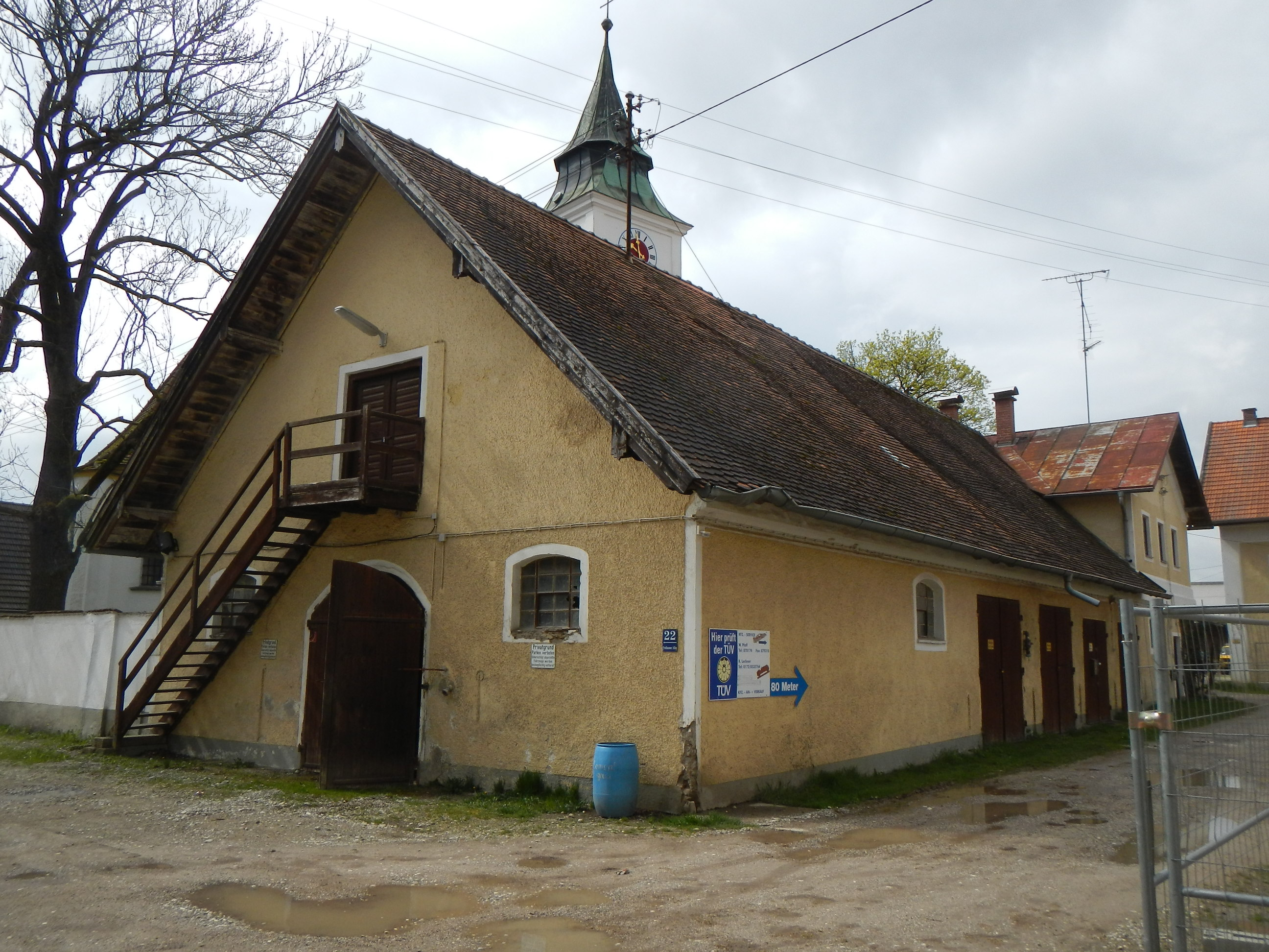 Ehem Pferdestall in Gut Freiham